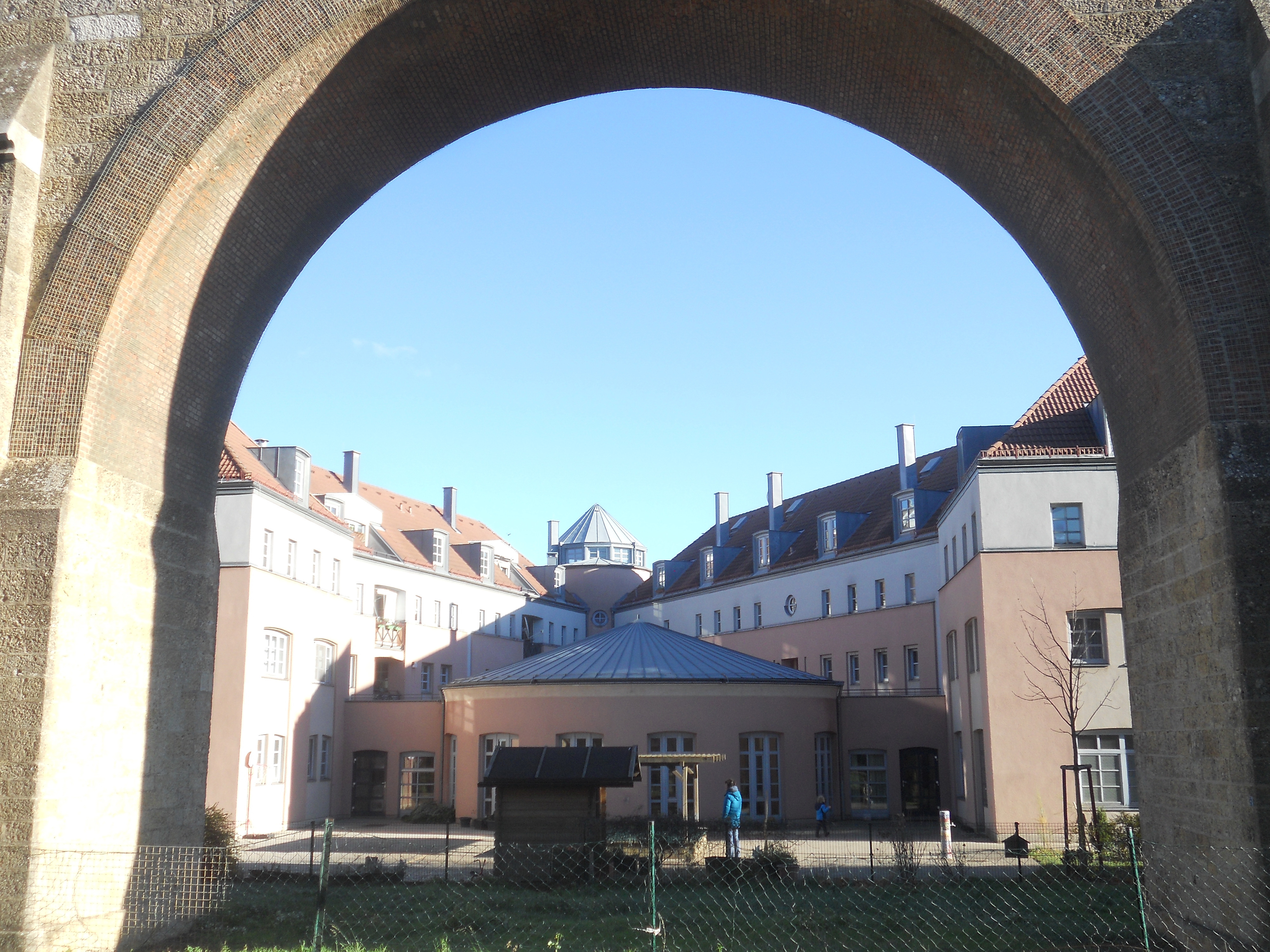 Kommunaler postmoderner Wohnbau, Postmoderne Anlage von Krier, Wachberger, Gebhart, östlicher Teil, durch den Liesinger Aquädukt gesehen